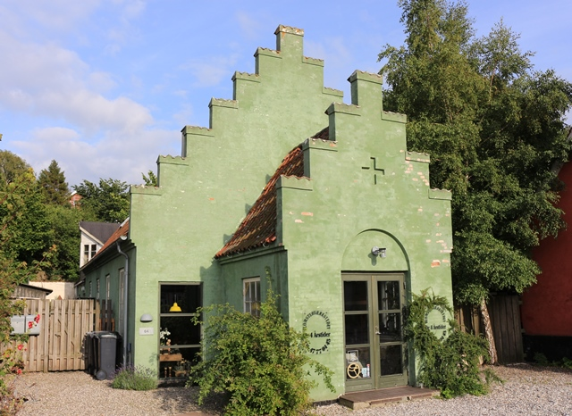 Kristi Menigheds tidl. kirkebygning Frederiksværk, Danmark